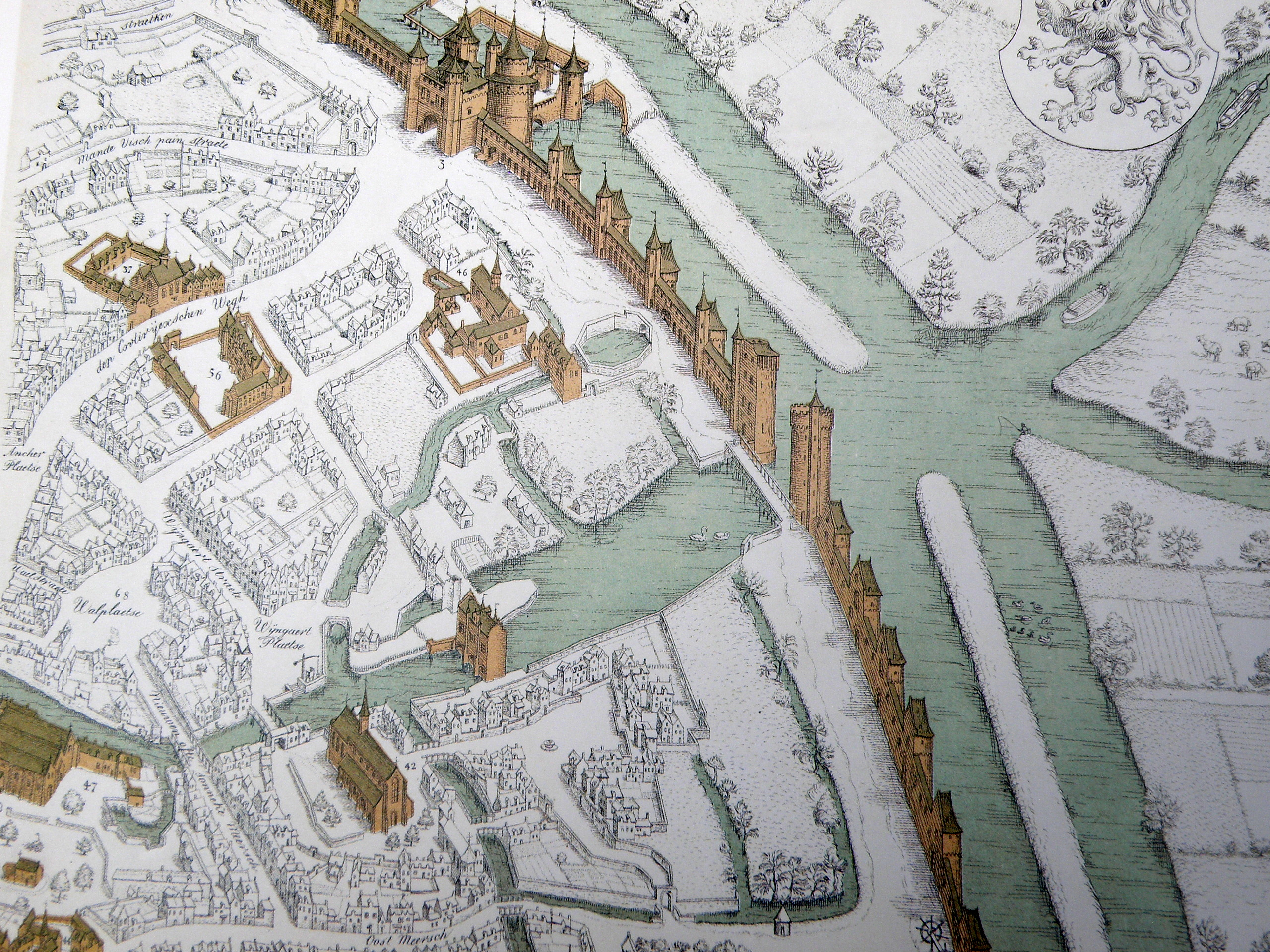 Plan van Brugge (1562) door Marcus Gerardus (of Marcus Gerards, Marc Gheeraerts). Close-up van het zuidelijke deel van Brugge (rond begijnhof).